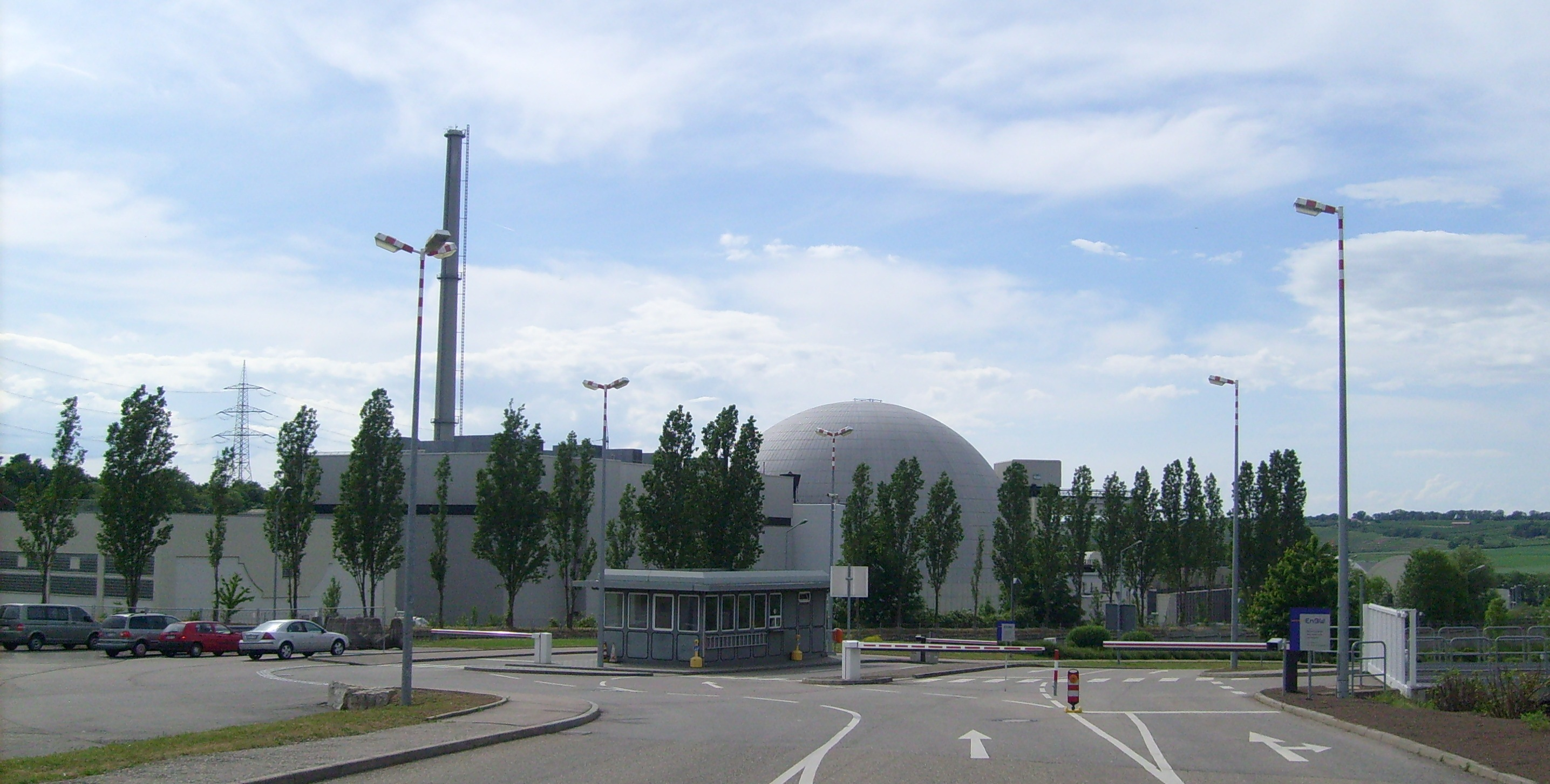 Kernkraftwerk Neckarwestheim 2 mit dem Abluftkamin und dem Bahnstromgebäude